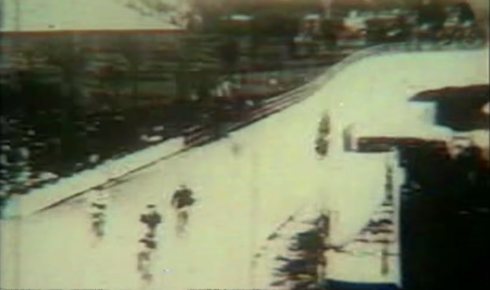 Fotograma de "Carrera de bicicletas en el velódromo de Arroyo Seco", primer documental uruguayo, del año 1898.